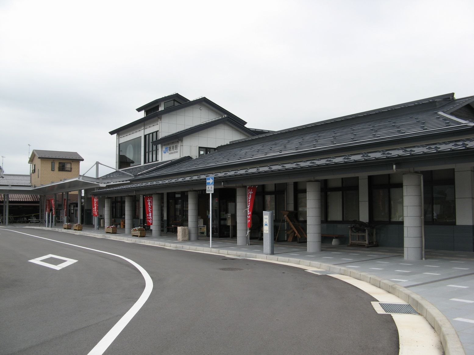 高月駅東口